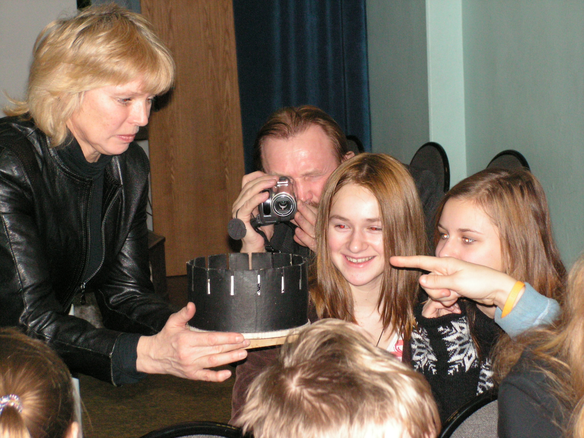 центр "Перспектива", мастер класс по киноискусству